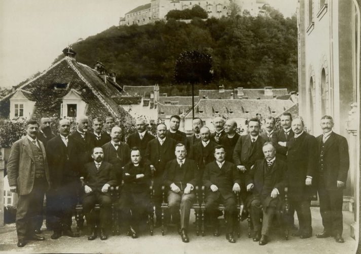 Klub kranjskih deželnozborskih poslancev SLS tik pred vojno (Iv. Zajc, Evgen Lampe, Ivan Šušteršič, Vl. Pegan, Povše, Evgen Jarc, Janez Krek, idr.)